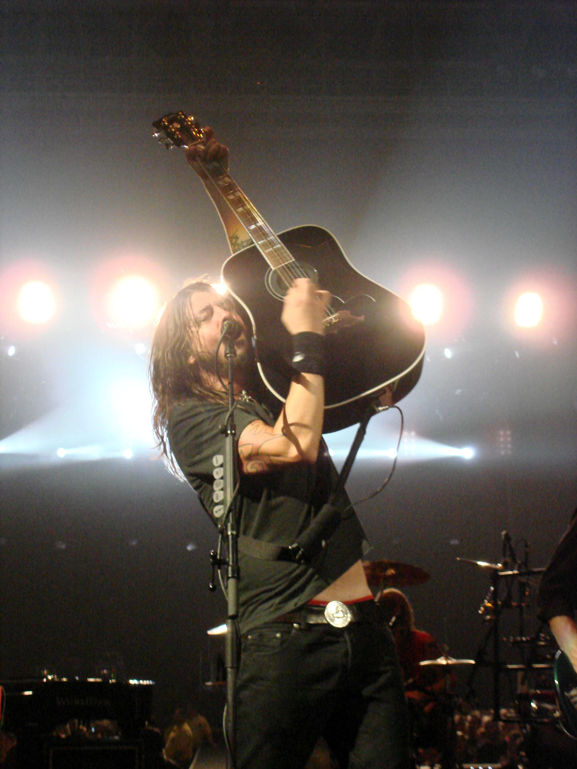 oh grohl...